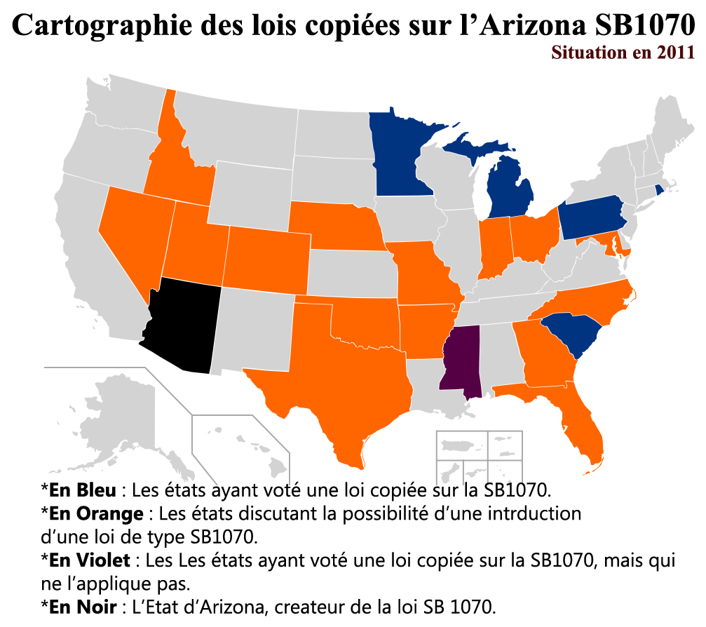 Lois copiées sur la loi SB 1070 a travers les États-Unis